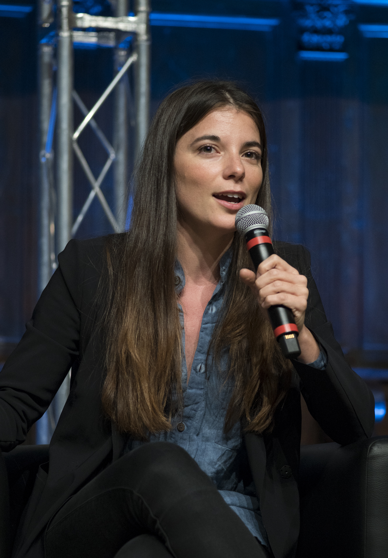 Giulia Innocenzi in Sala dei Notari a Perugia per il Festival Internazionale del Giornalismo 2017.